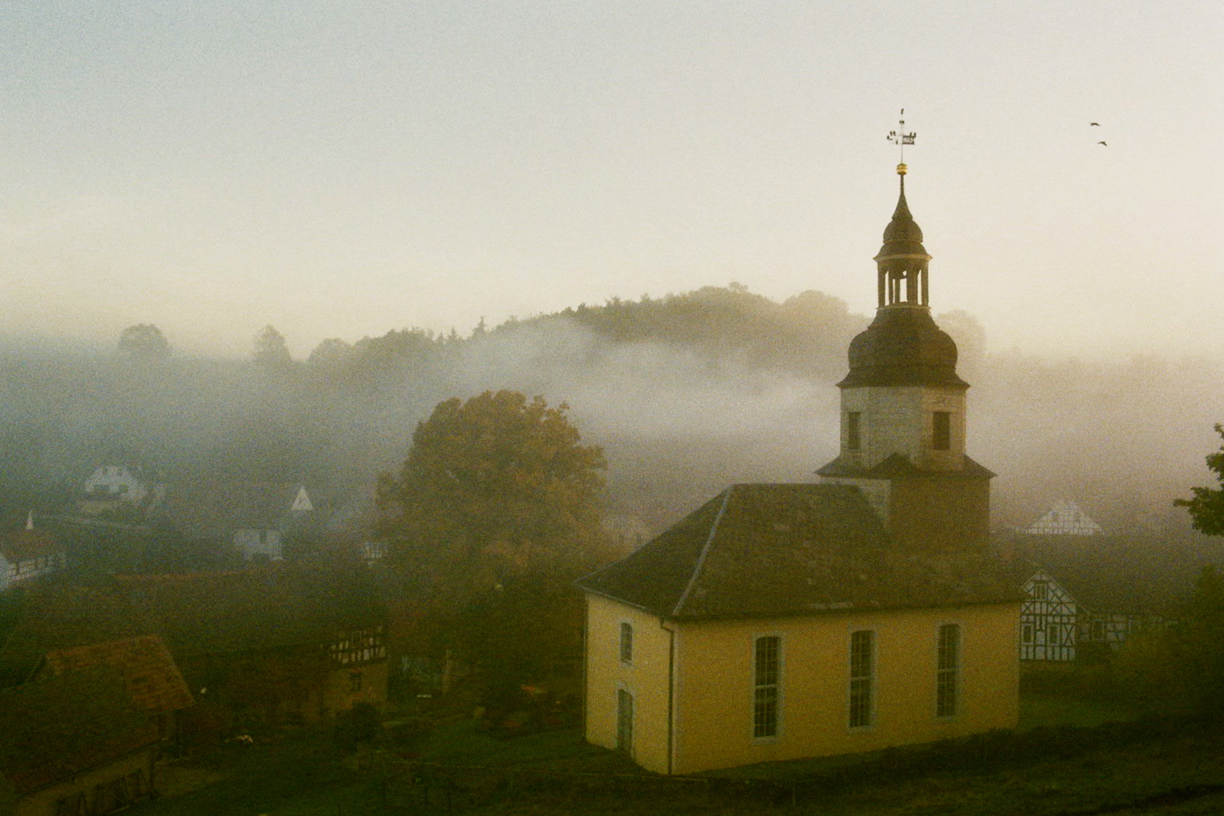 Hellborn mit Dorfkirche im Morgennebel, November 2012